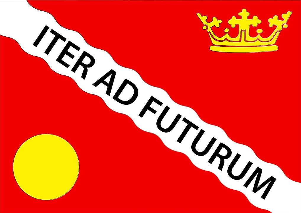 Bandeira do Município de Caiçara no Estado da Paraíba, Brasil.